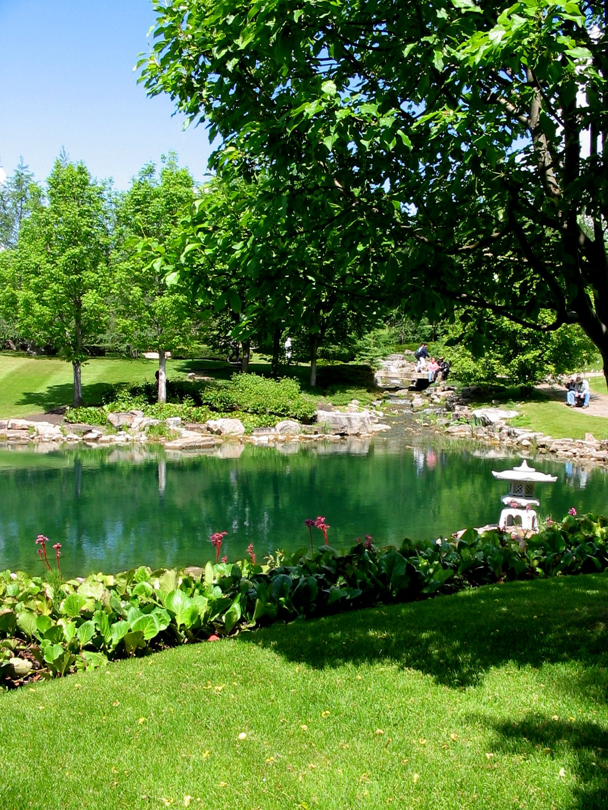 Japanese Garden of Devonian Botanical Garden.